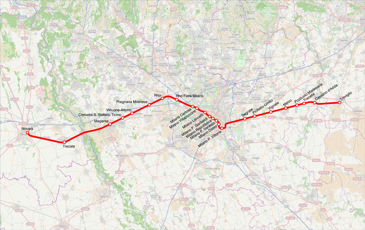 Mappa della linea S6 del servizio ferroviario suburbano di Milano.